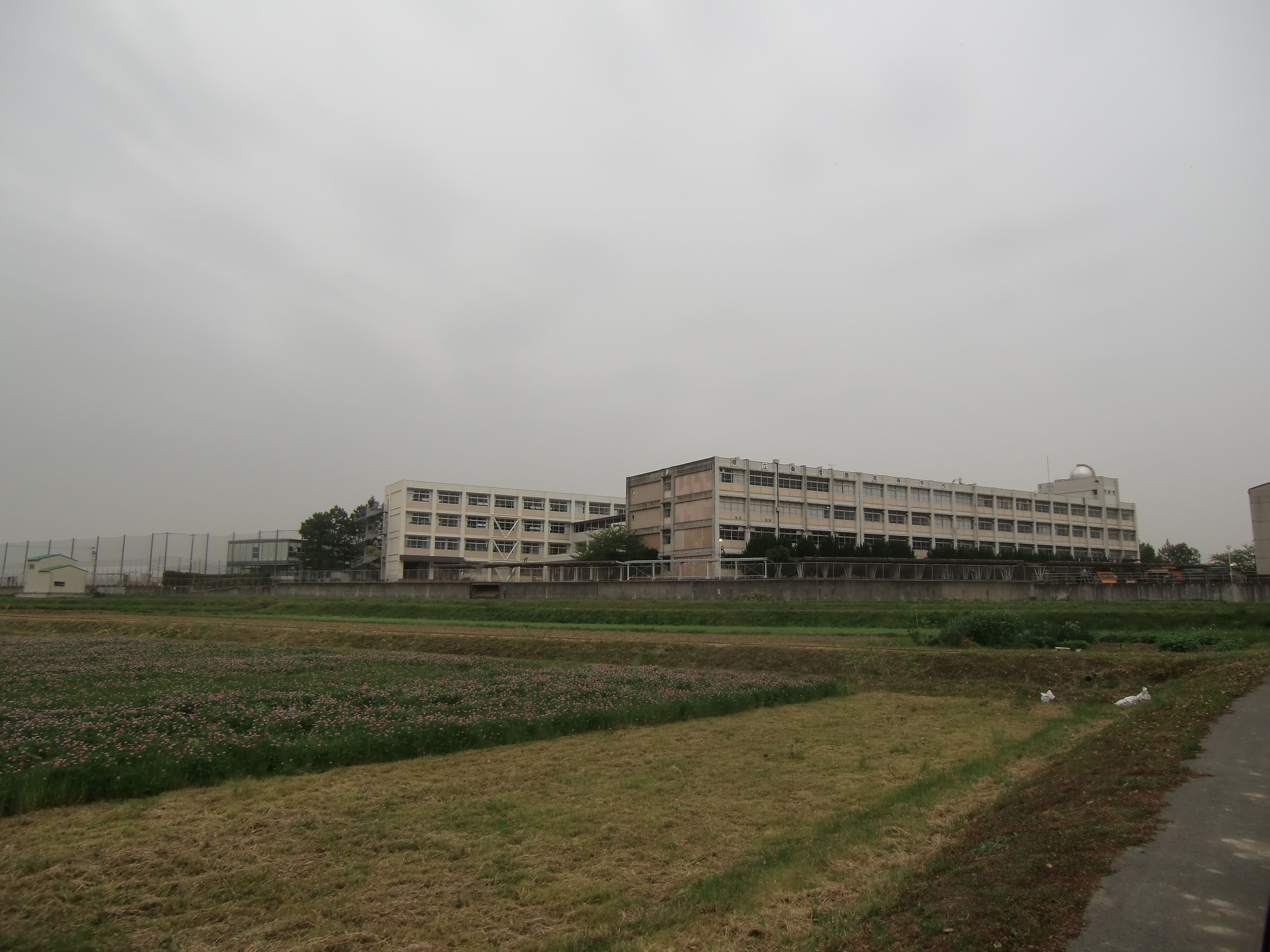 兵庫県立東播磨高等学校の遠景